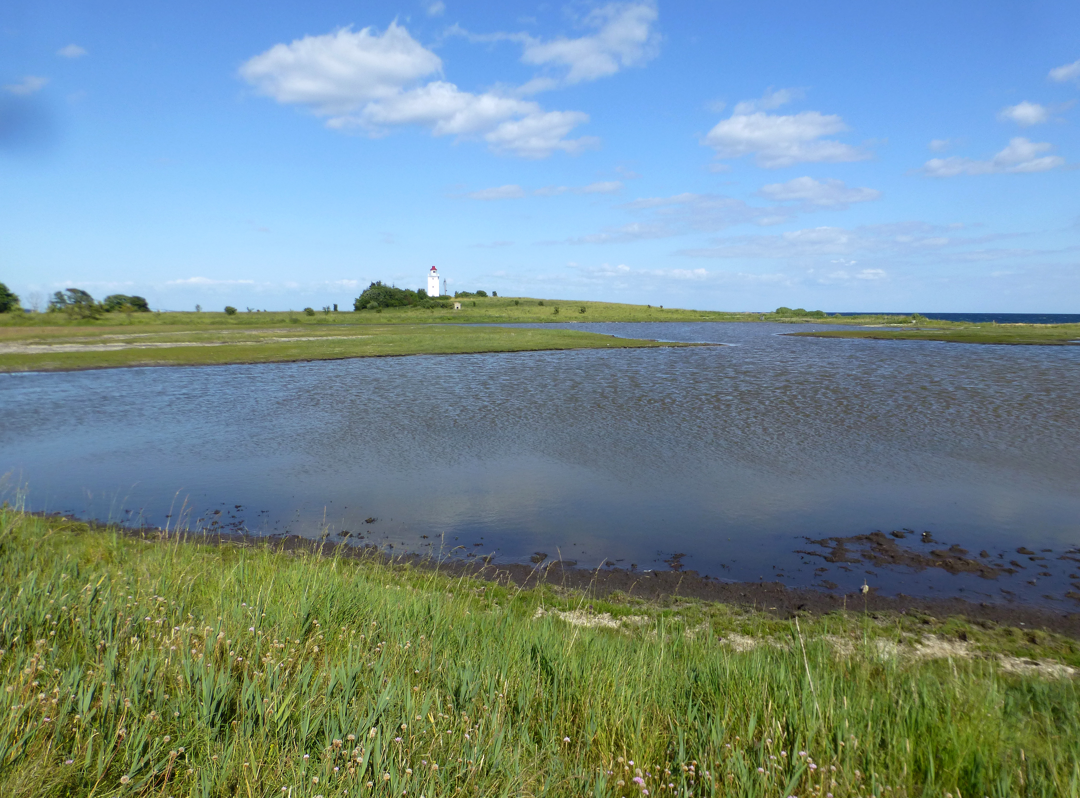 Østerø- Knudshoved Fyr